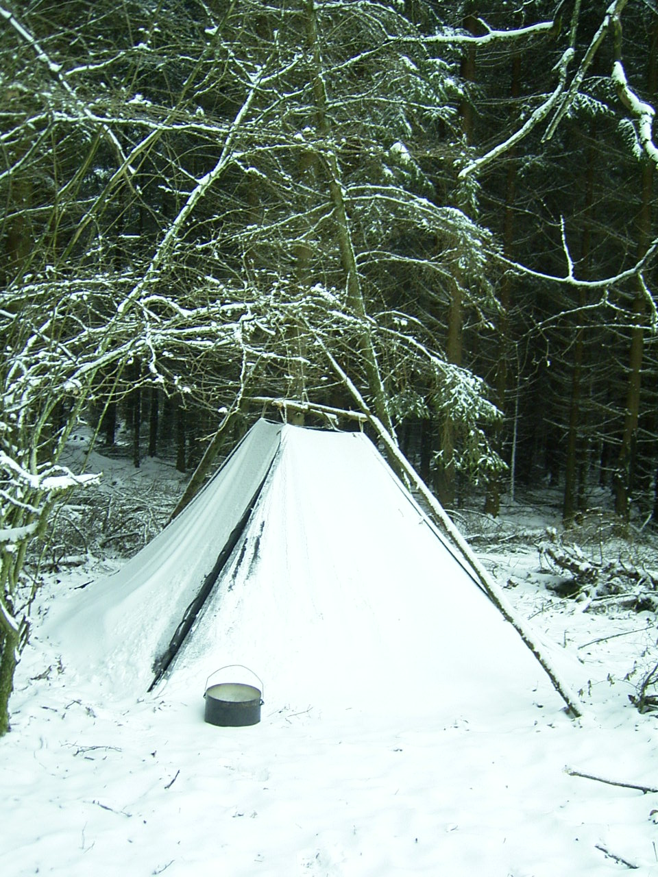 Kohte im Schnee